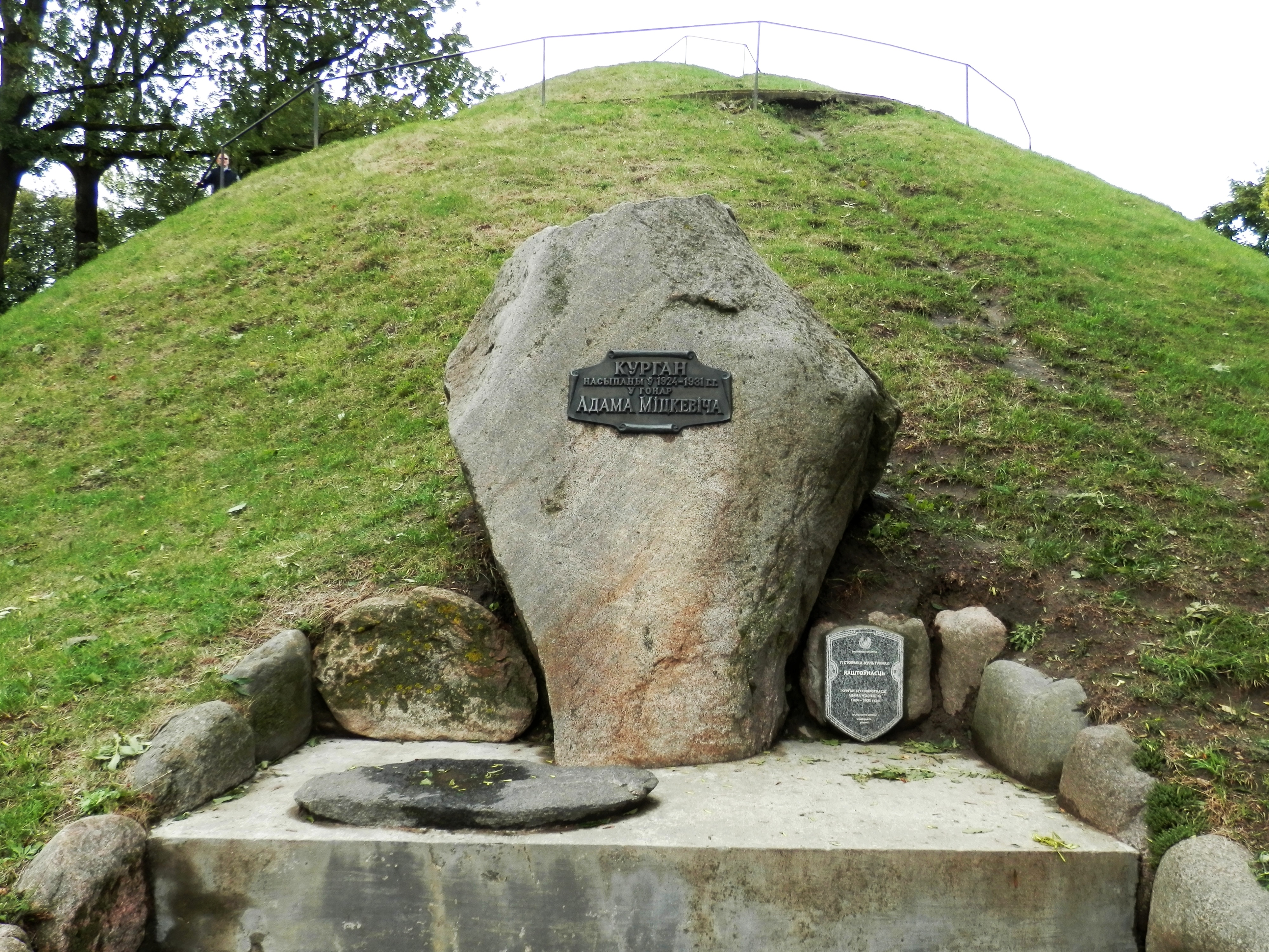 W Nowogródku - ў Навагрудку